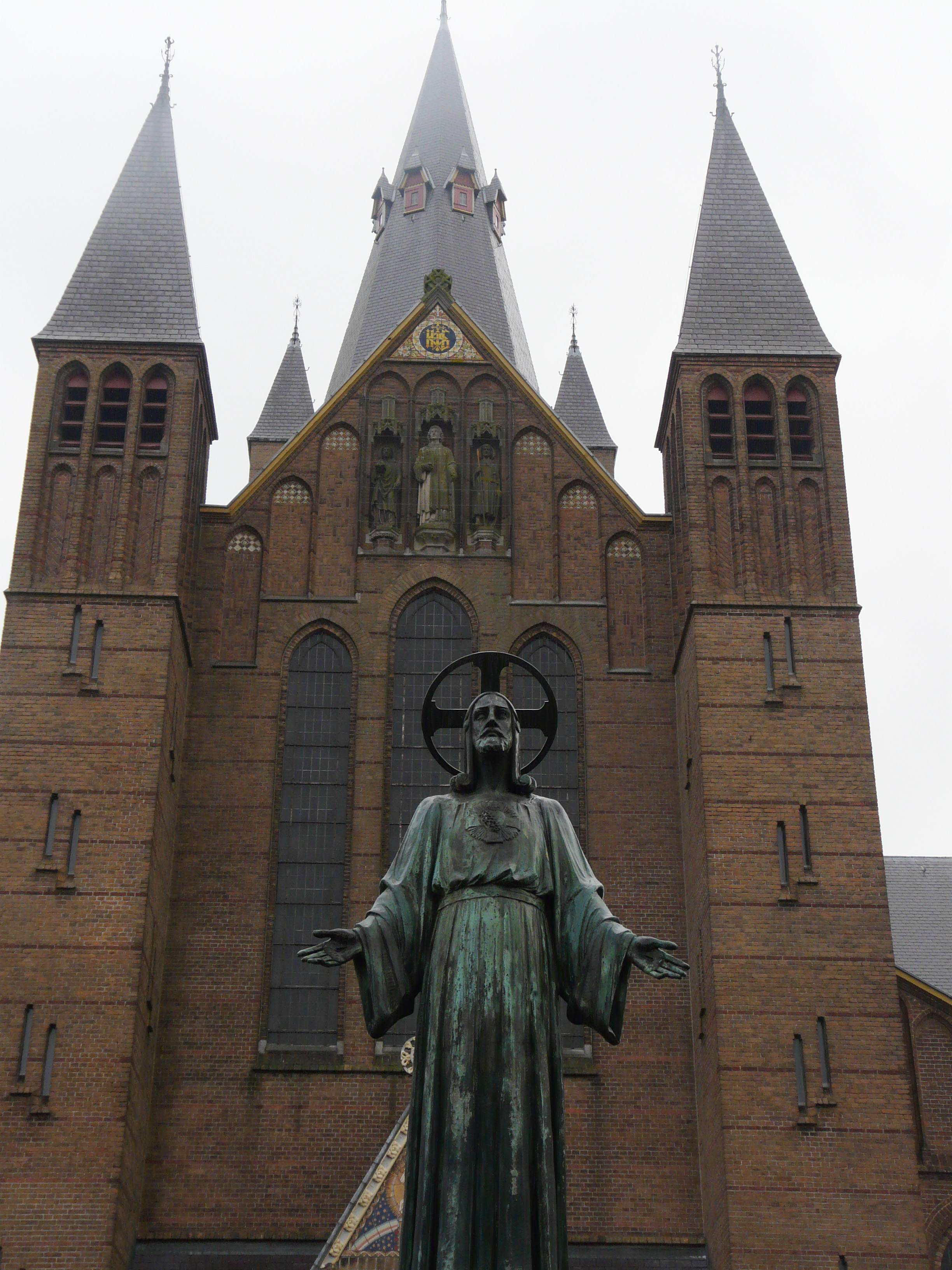 Noordzijde van de Sint-Laurentiuskerk.